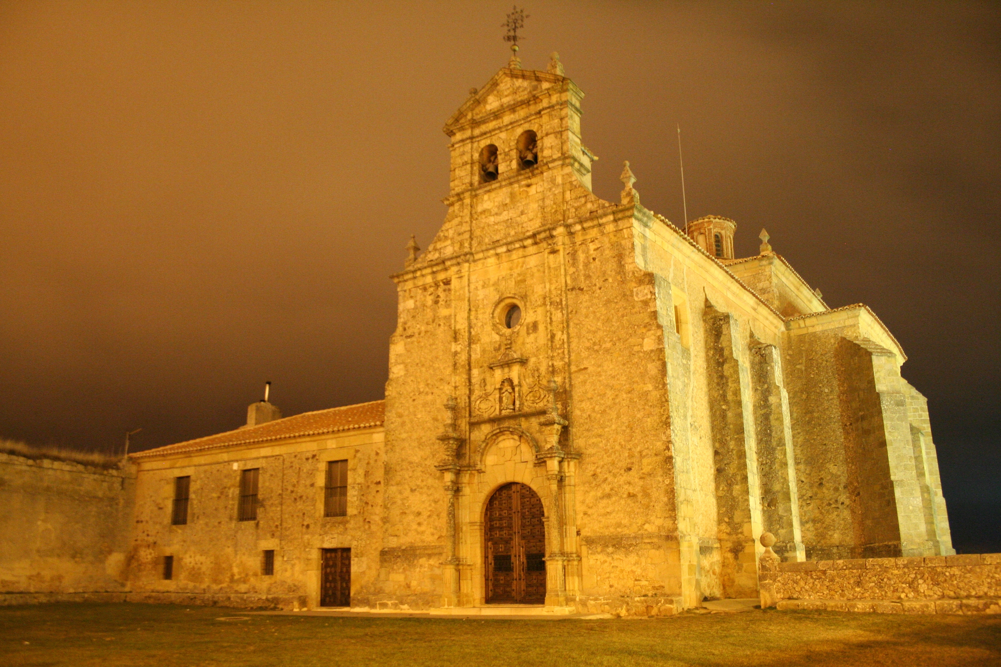 Ermita de Nuestra Señora del Mirón vista de noche (Soria).